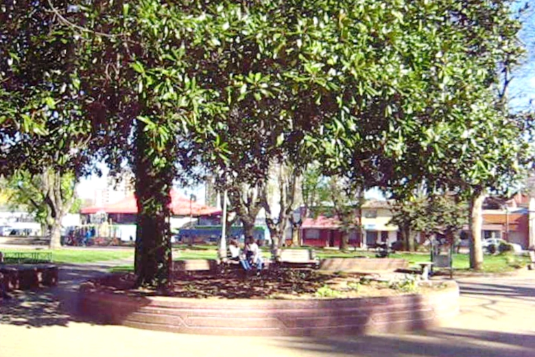 Plaza Teniente Dagoberto Godoy de Temuco, Chile.